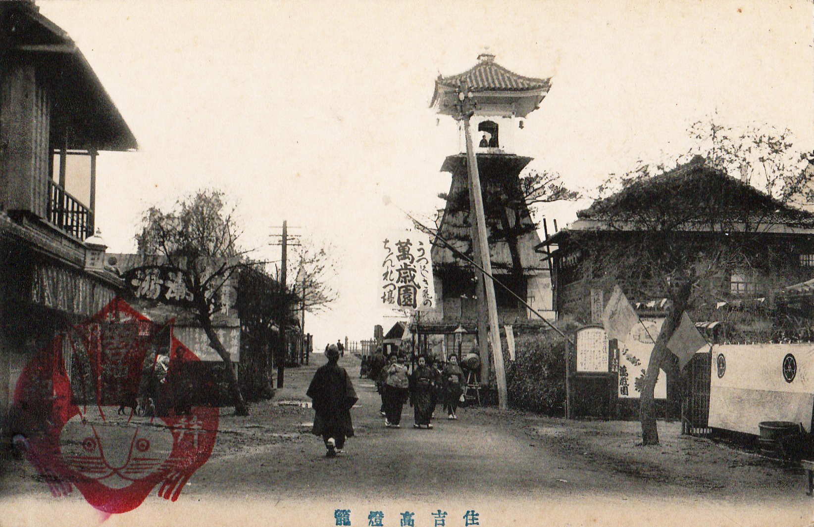 明治３１年以前と思われる高燈籠。左側には「潮湯」の看板も見える。